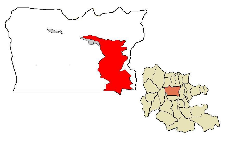 mapa de naguanagua